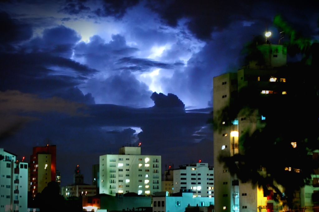 Vista da Lapa, rua Nazaré Paulista, Alto de Pinheiros - SP - Brasil 7:30 da noite